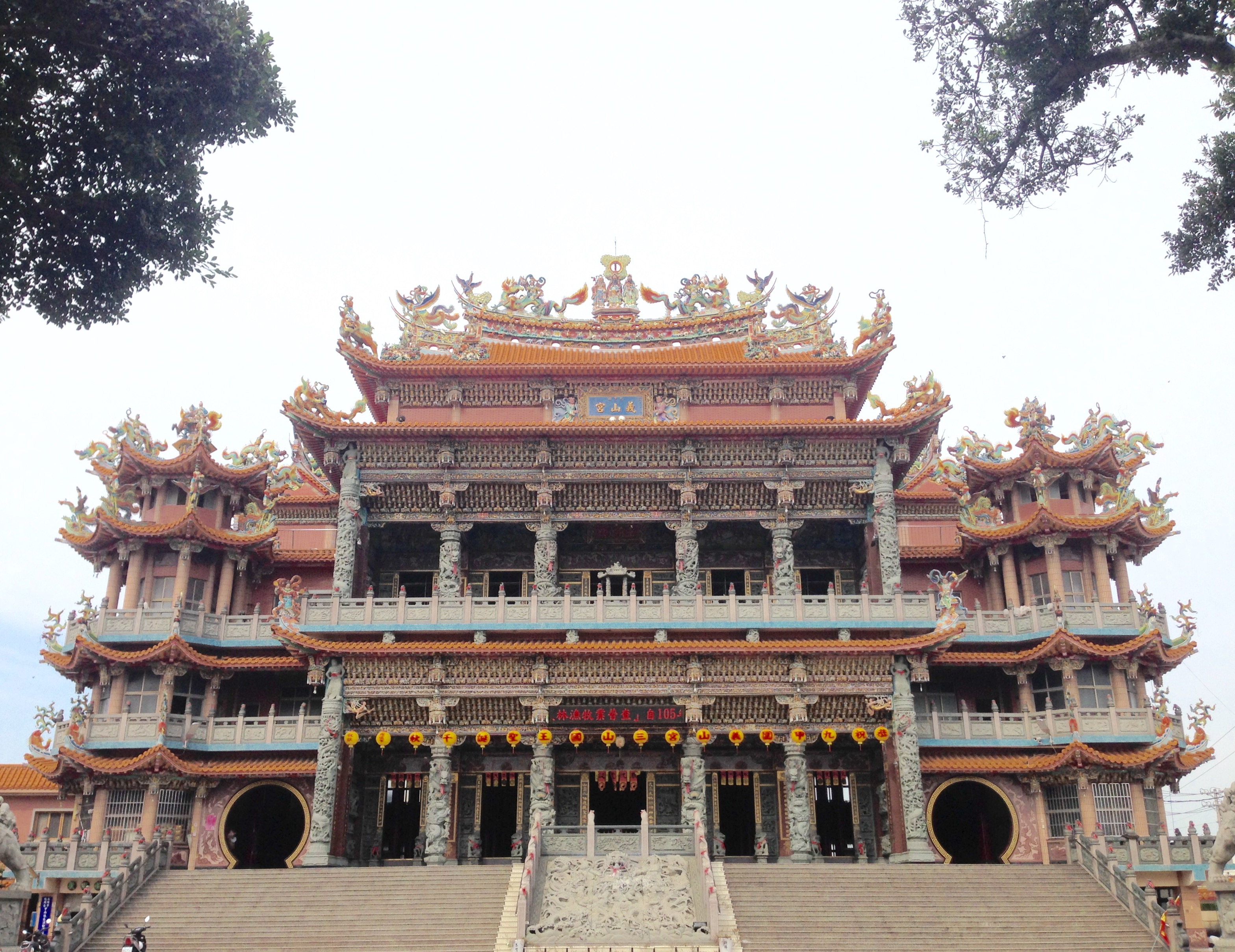 九甲圍義山宮